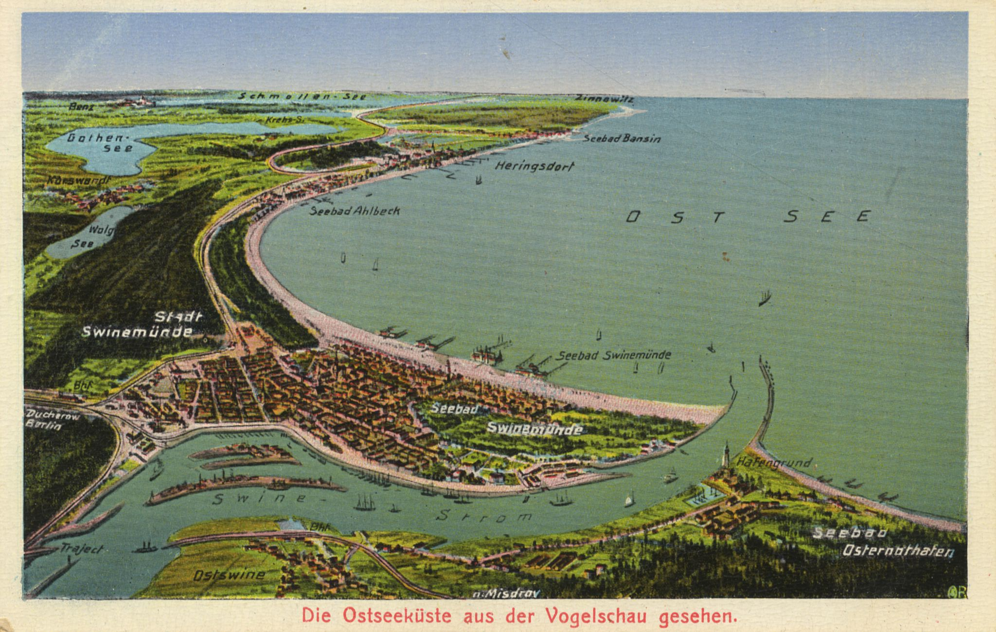 Die Ostseeküste aus der Vogelschau gesehen. Blick von Osten über Świnoujście (dt. Swinemünde) und die Insel Usedom nach Westen.